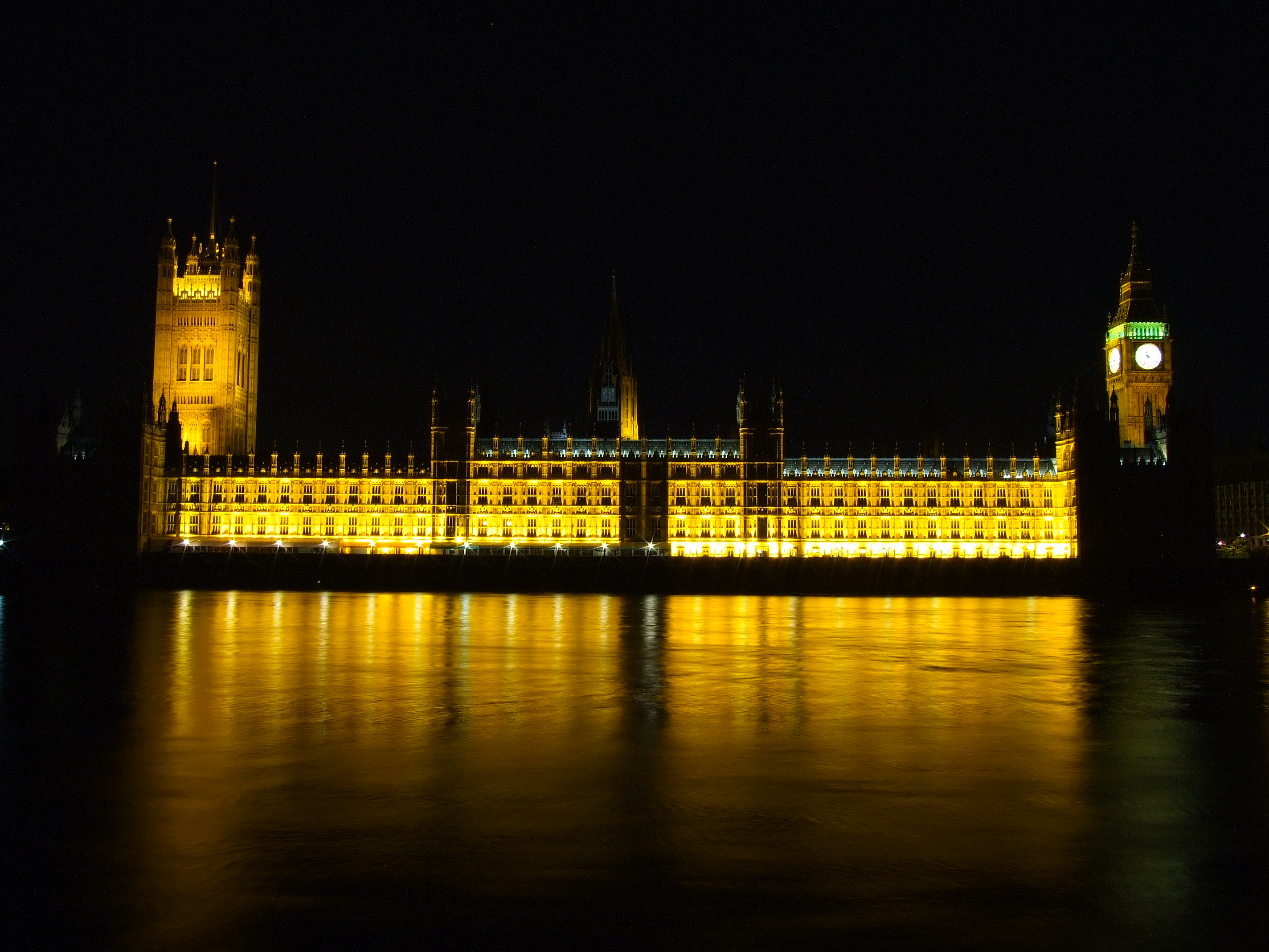 Поглед на Вестминстерската палата, ноќе.